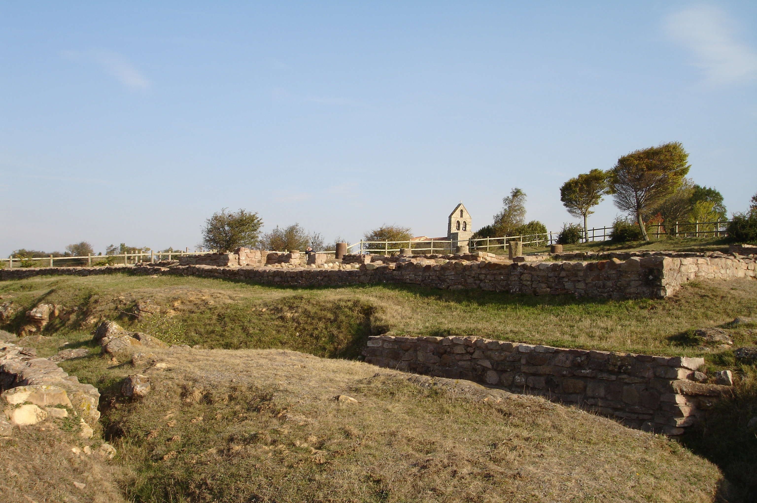 Vista parcial de la «Casa de los Mosaicos», en el sector norte del yacimiento arqueológico de Julióbriga. La edificación se encuentra excavada sólo parcialmente. Más allá, se observa la «Casa de los Morillos» y, al fondo, la Iglesia de Santa María de Retortillo.